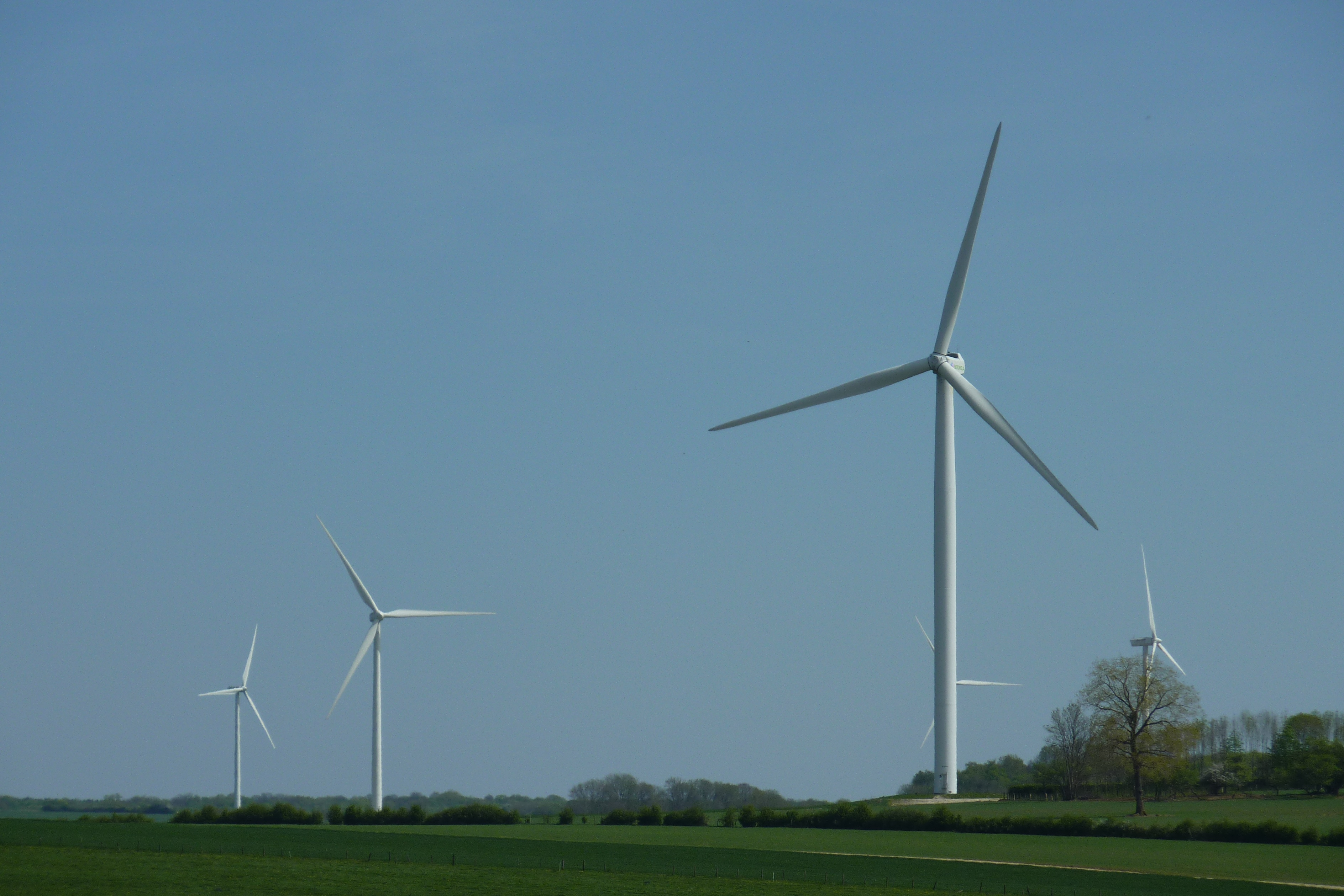 Vue d'une partie du parc éolien situé entre Érize-Saint-Dizier et Naives-Rosières, au nord de Bar-le-Duc, dans la Meuse.